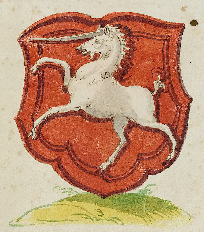 Wappen aus: David Wolleber: Chorographia Württemberg, [Schorndorf] 1591, Universitätsbibliothek Tübingen, Mh 6,1 Wappen Reichsstadt Gmünd